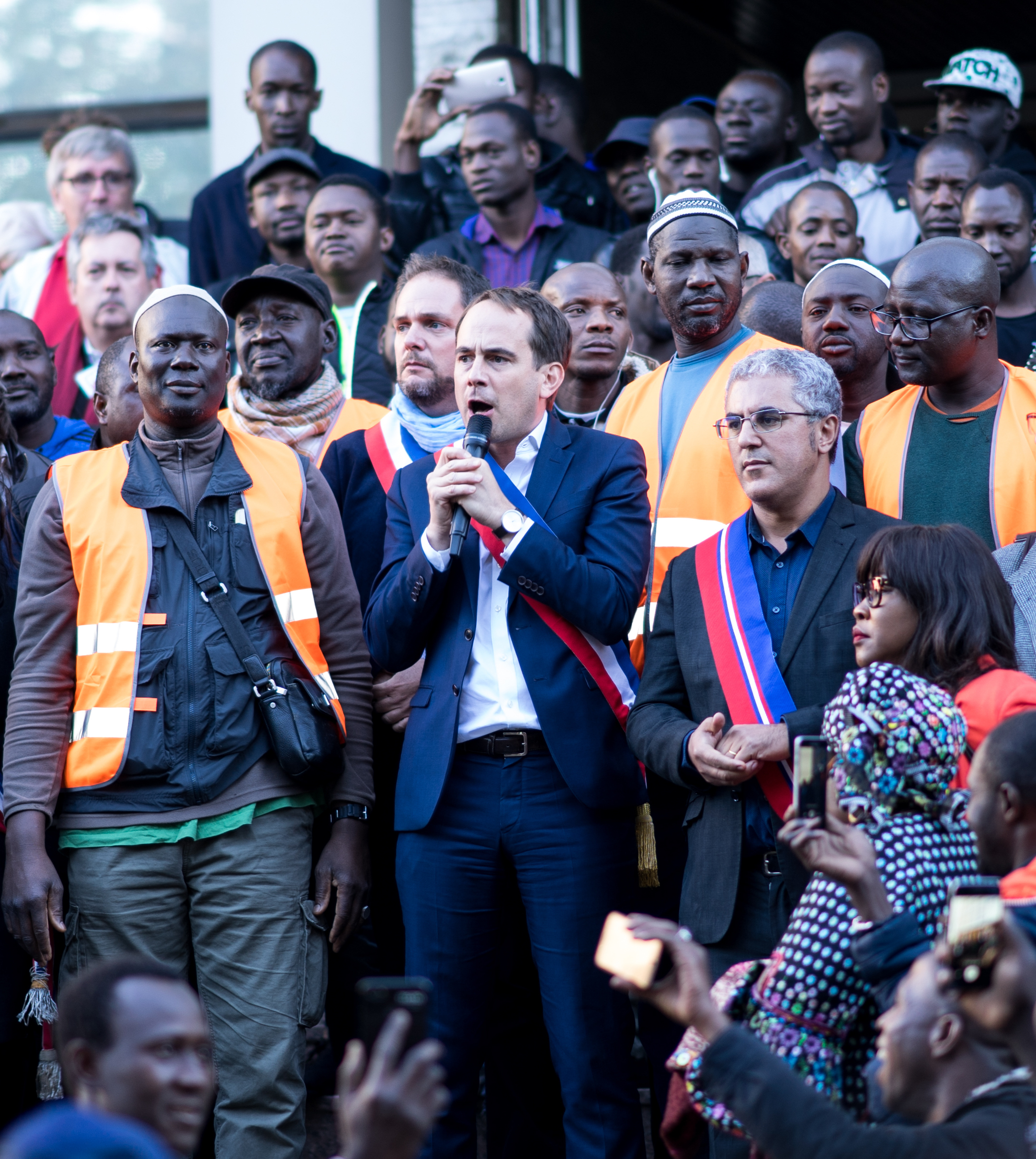 Patrick Bessac